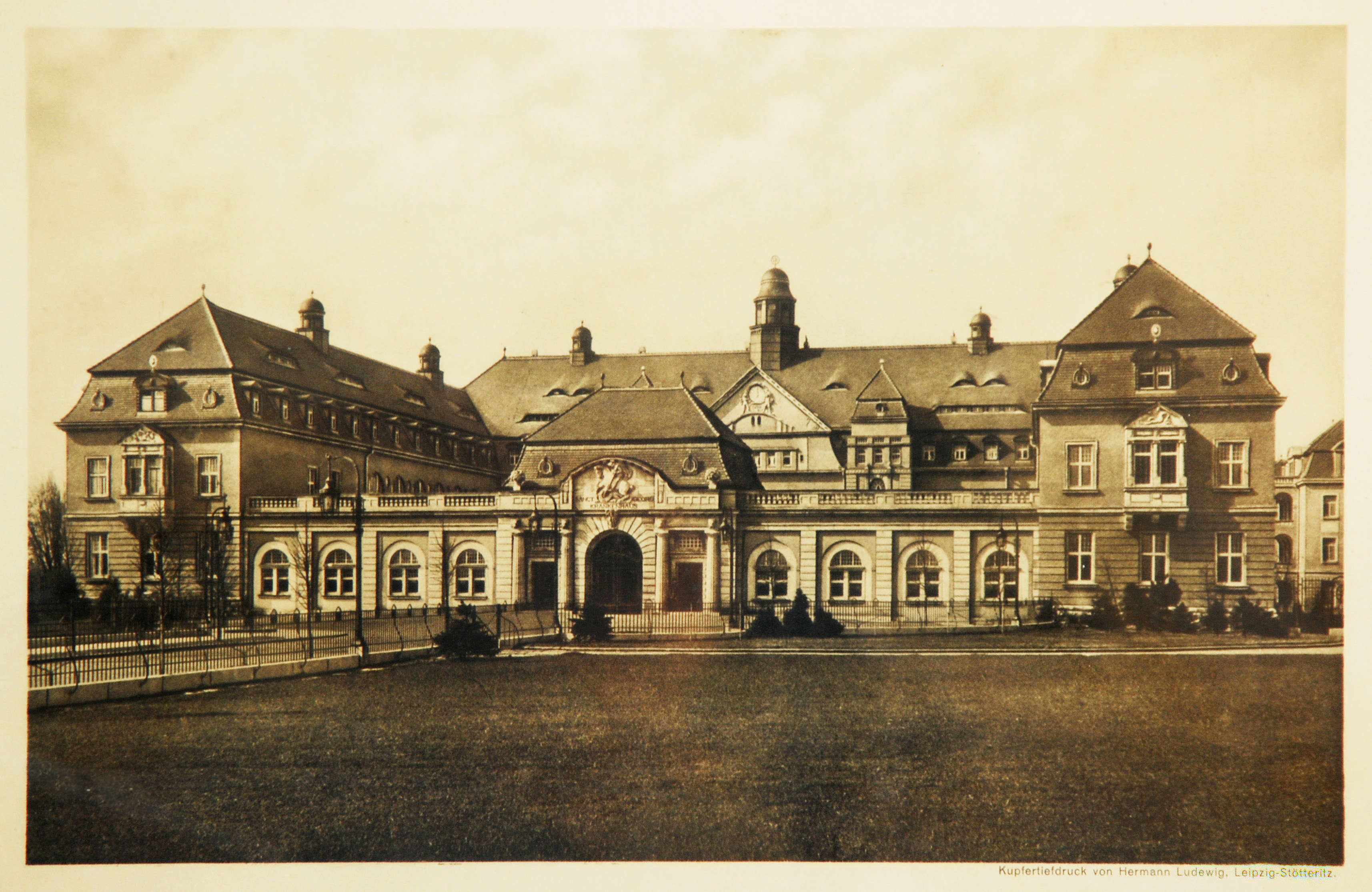 Krankenhaus St. Georg Leipzig, um 1913 (Eröffnungsjahr). Eingang und Verwaltungsgebäude. Kupfertiefdruck 17,5 × 27,5 cm, Druckerei Hermann Ludewig Leipzig-Stötteritz